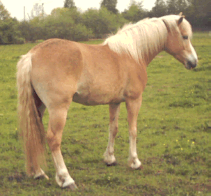 9 jähriger Arabohaflinger-Wallach "Hennes" auf der Weide.